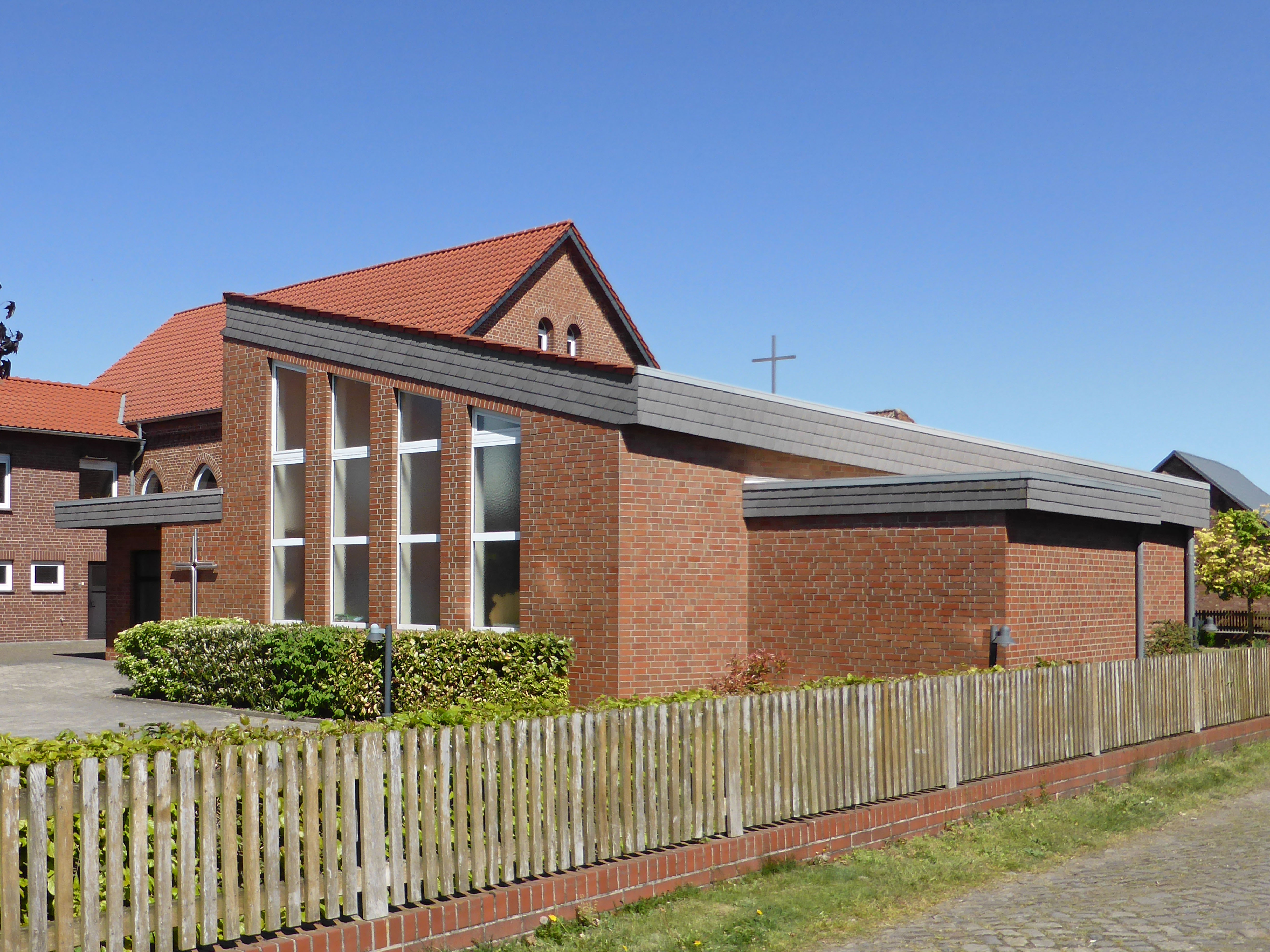 Evangelisch-baptistische Kreuzkirche in Parsau.